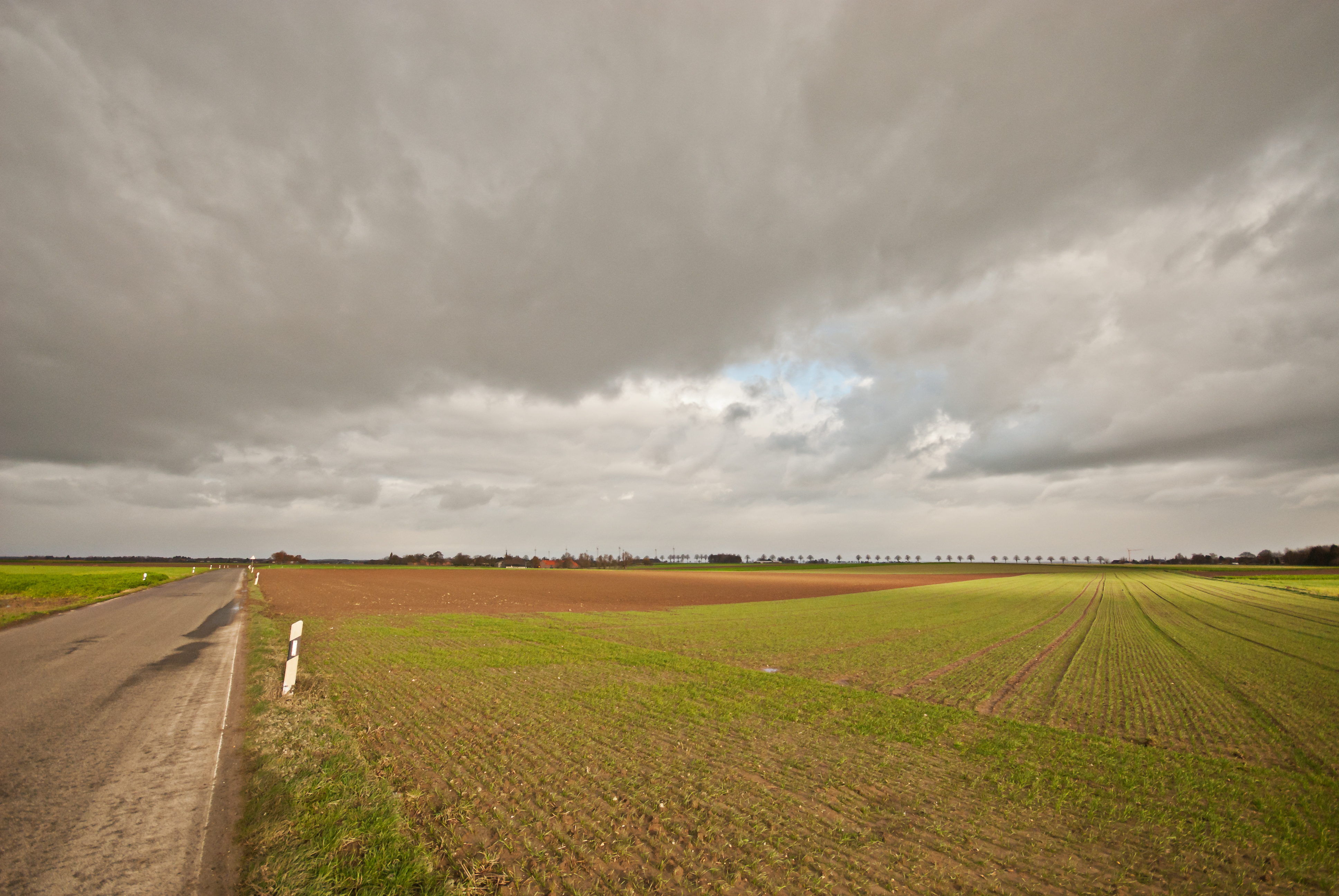 Typisches Landschaftsbild der Geilenkirchener Lehmplatte: waldlose und baumarme, nur flachgewellte Ackerflur. Typisch für die Siedlungsstruktur das im Hintergrund erkennbare Straßendorf Selsten, welches einem flachen Trockental folgt.